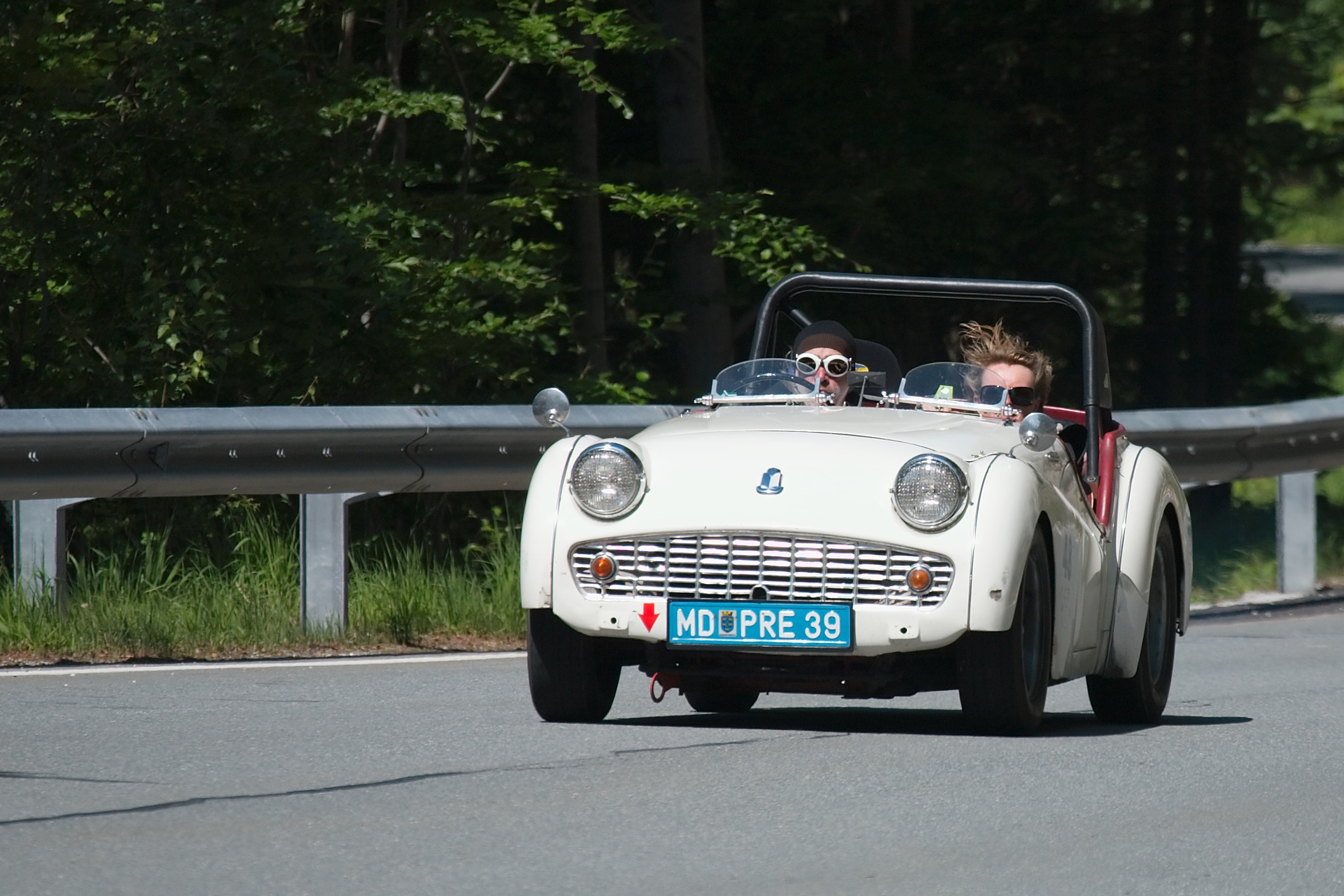 Triumph TR3 at Gaisbergrennen 2009